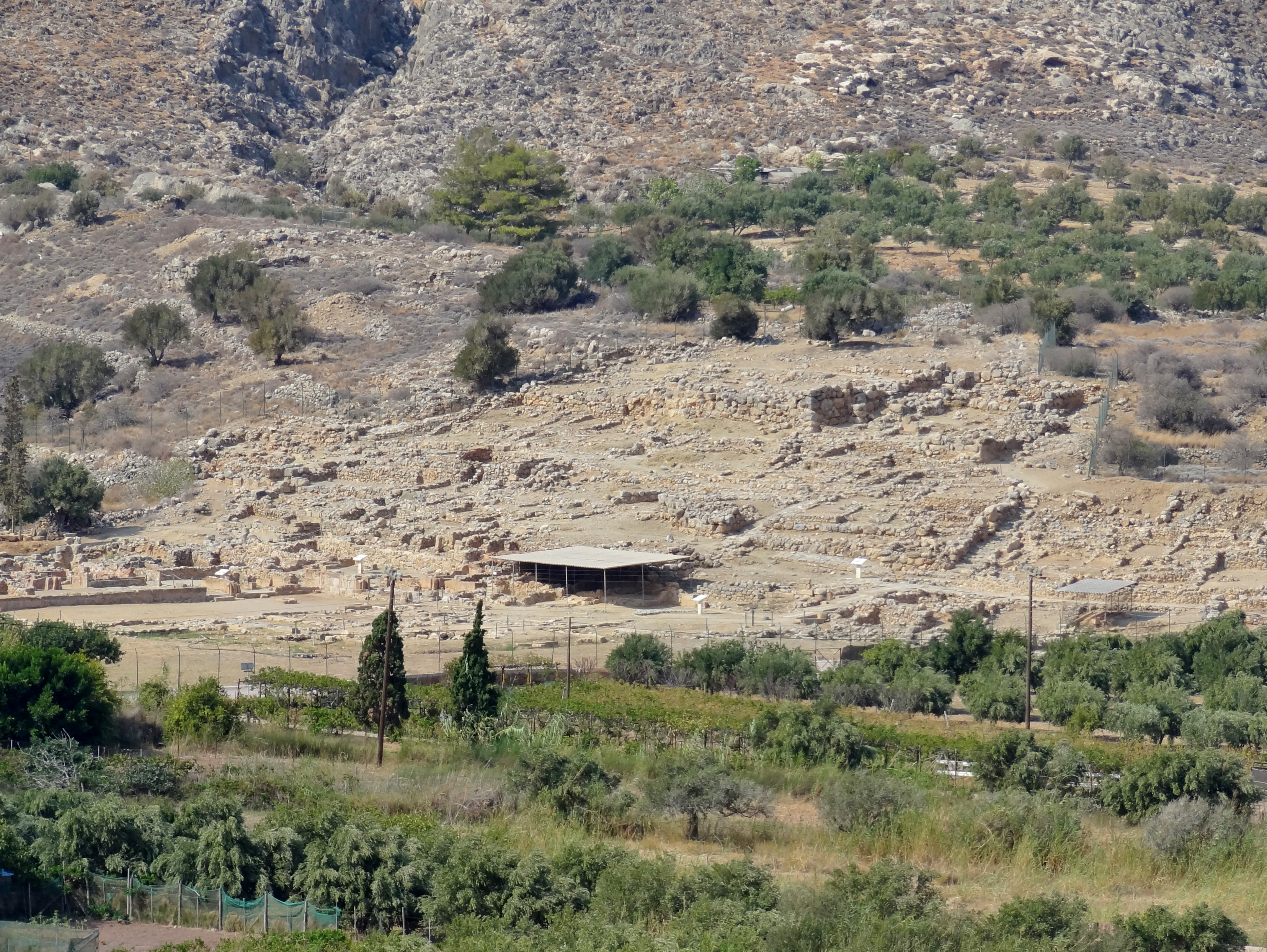 Palast von Zakros (Ανάκτορο της Ζάκρου) bei Kato Zakros (Κάτω Ζάκρος), Gemeinde Sitia, Kreta, Griechenland